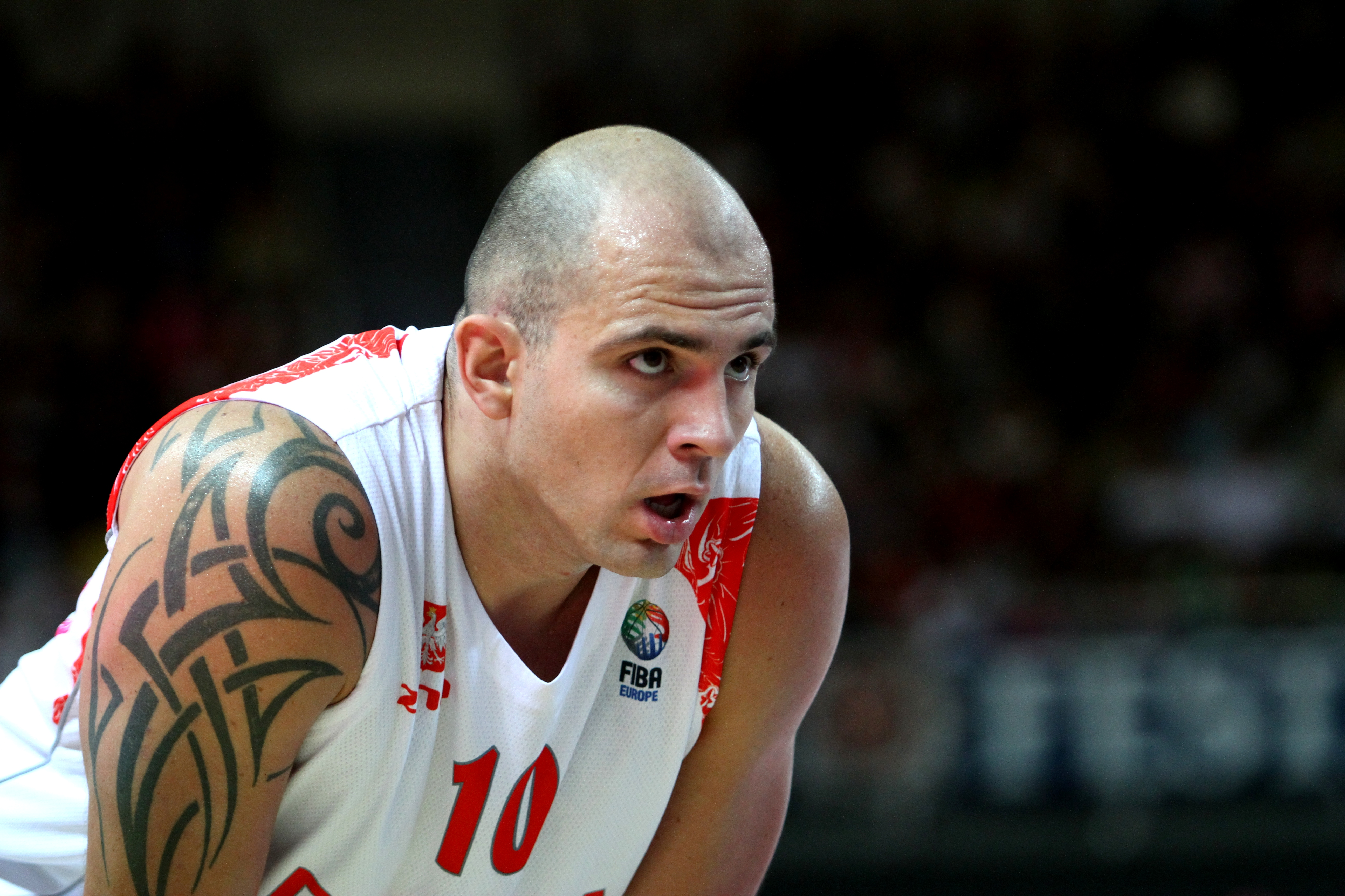 Eliminacje do EuroBasketu 2015: Polska – Luksemburg, Koszalin, 27 sierpnia 2014. Szymon Szewczyk